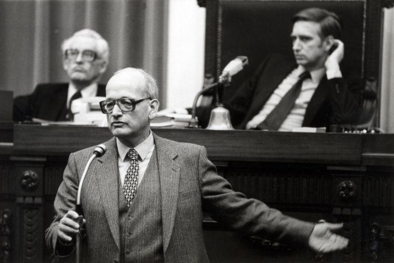 CPN-kamerlid Joop Wolff tijdens het interpellatiedebat inzake het vervolgingsbeleid van de havenslepers van Smit-Internationale in Rotterdam 24 januari 1980